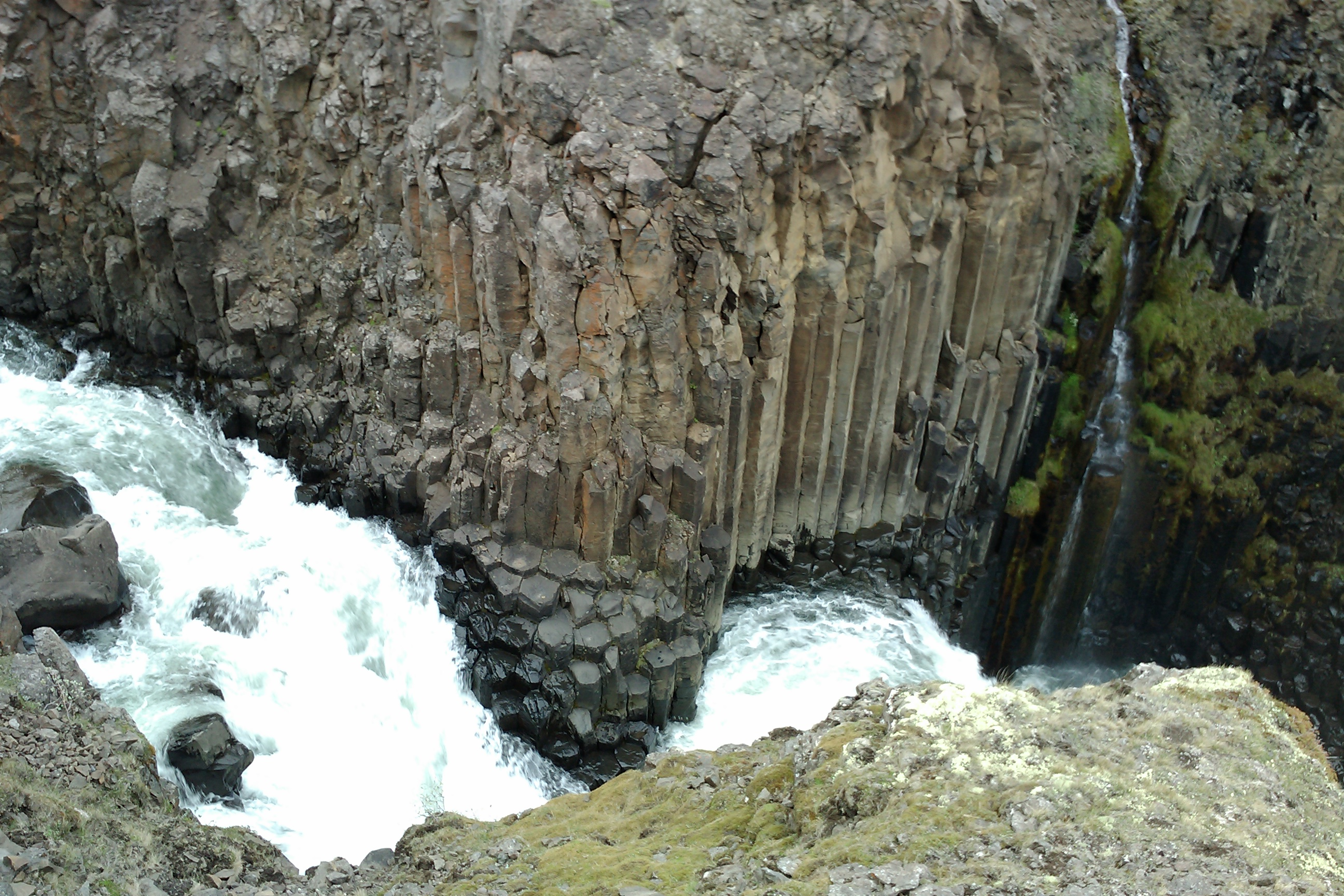 Chute d'eau de Litlanesfoss, Islande, vue depuis l'amont. Détails de colonnes de basalte.